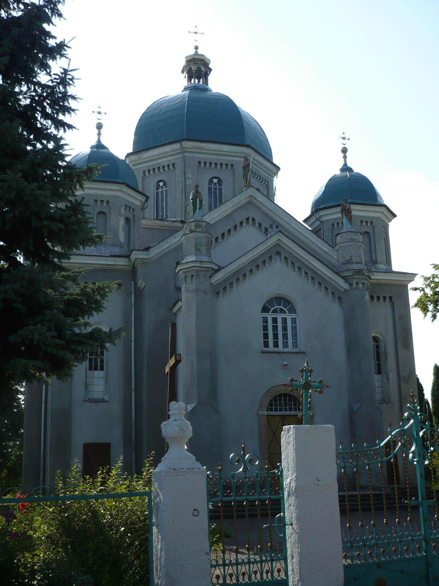 Olesko, cerkiew